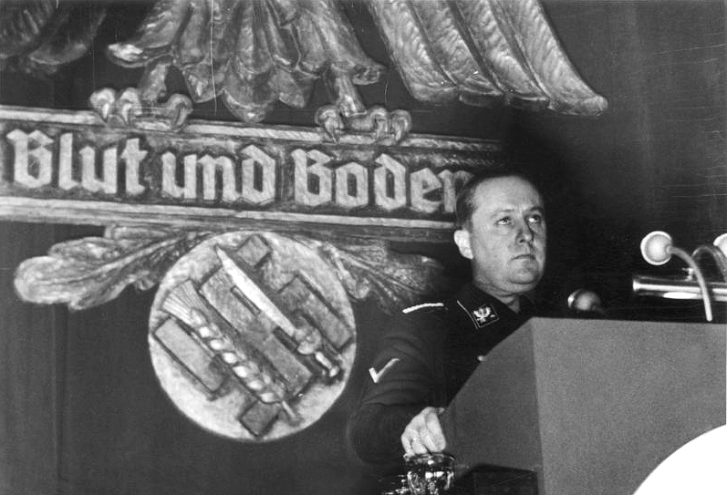 Zentralbild Reichsbauernführer Darré spricht Am 13.12.1937 sprach R.W. Darré während einer Großkundgebung des faschistischen Reichsnährstandes in Goslar. Lt. Angaben des Scherl-Bilderdienstes soll sich Darré von "3000 Vertretern des Landvolkes aus Niedersachsen.... über die Erzeugungsschlacht des kommenden Jahres" ausgelassen haben.